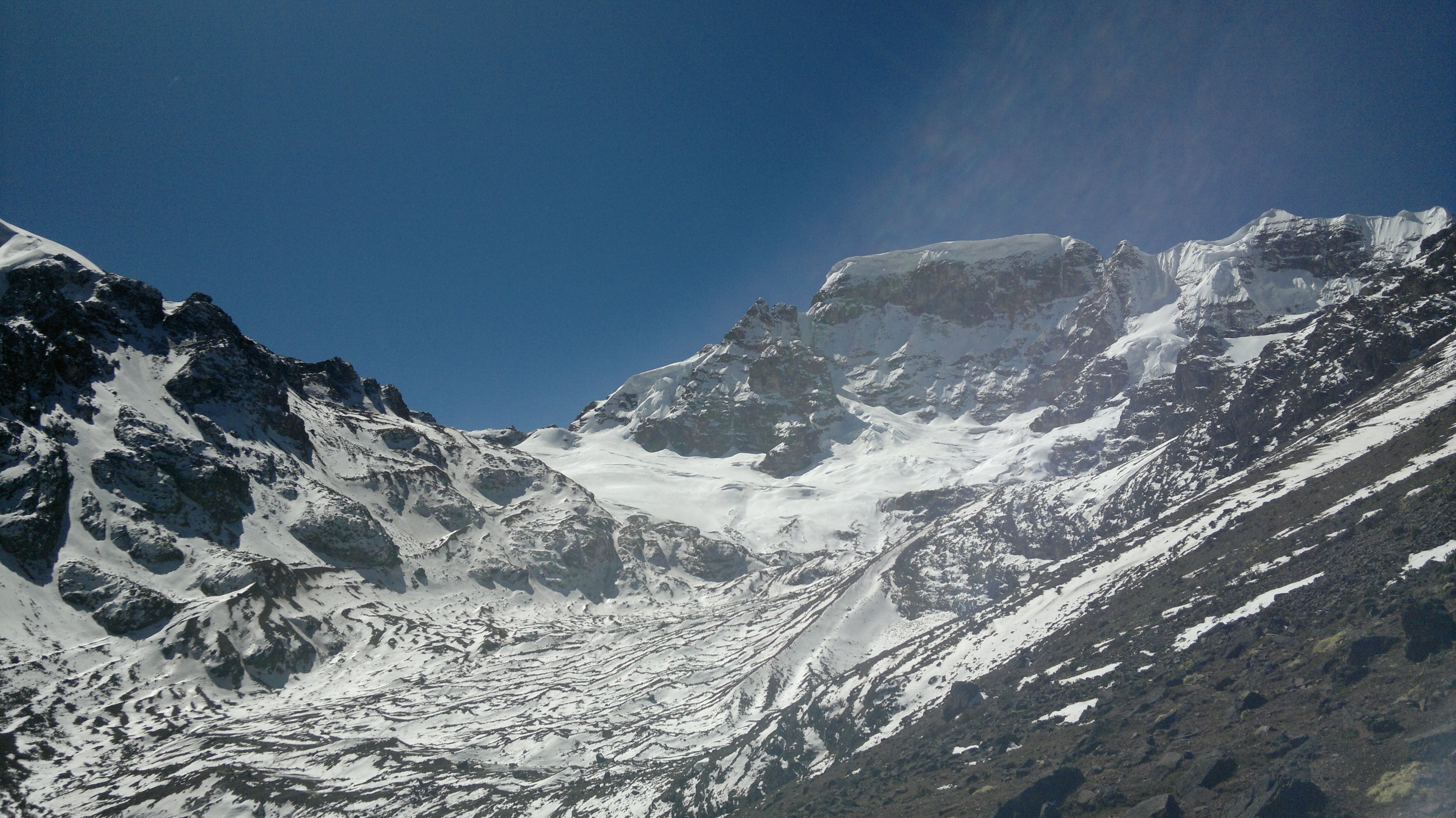 Es un hermoso nevado ubicado 5.877 msnm que forma parte de la cordillera del sur, ubicado en el distrito de Macusani